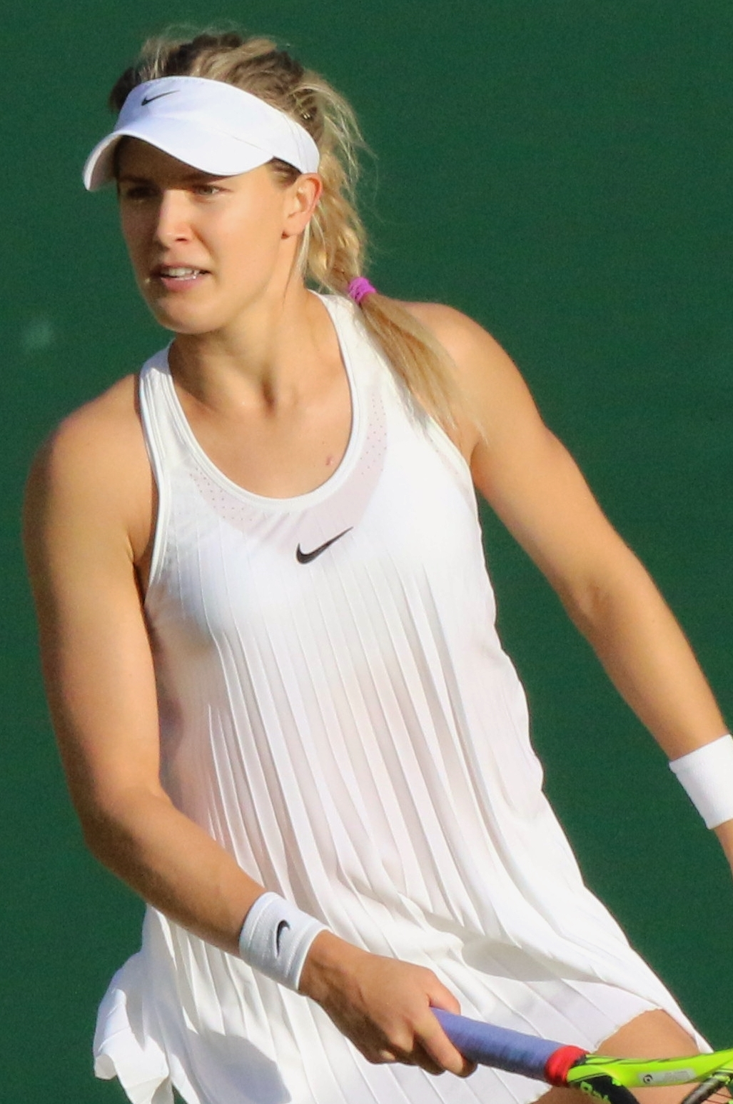 Bouchard WM16 (1)